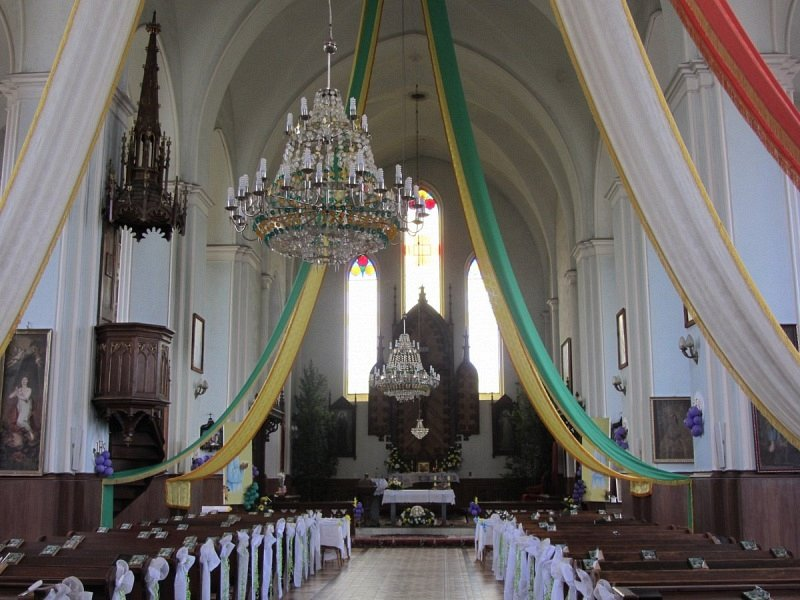 Рэпля. Касцёл